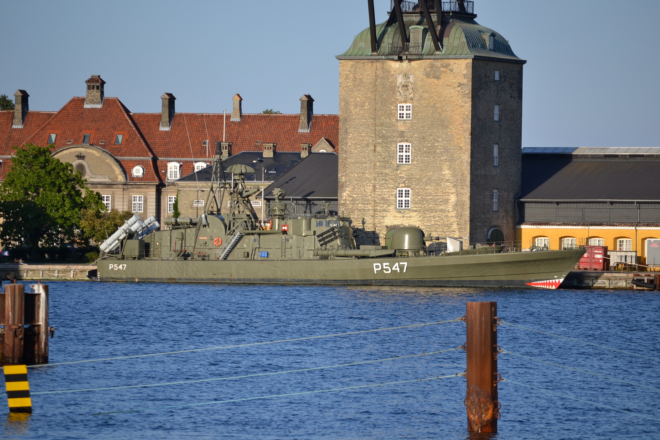 Mastekranen at Golmen in Copenhagen, Denmark